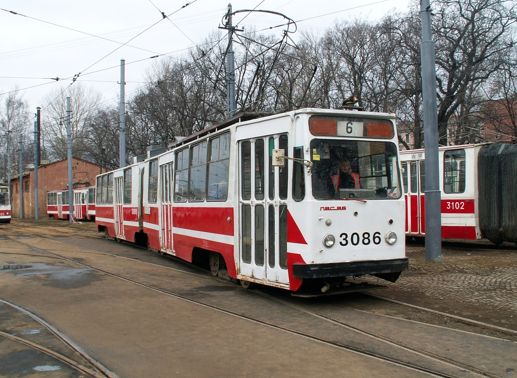 Трамвайный вагон ЛВС-86К 3086 на веере трампарка Леонова. Санкт-Петербург